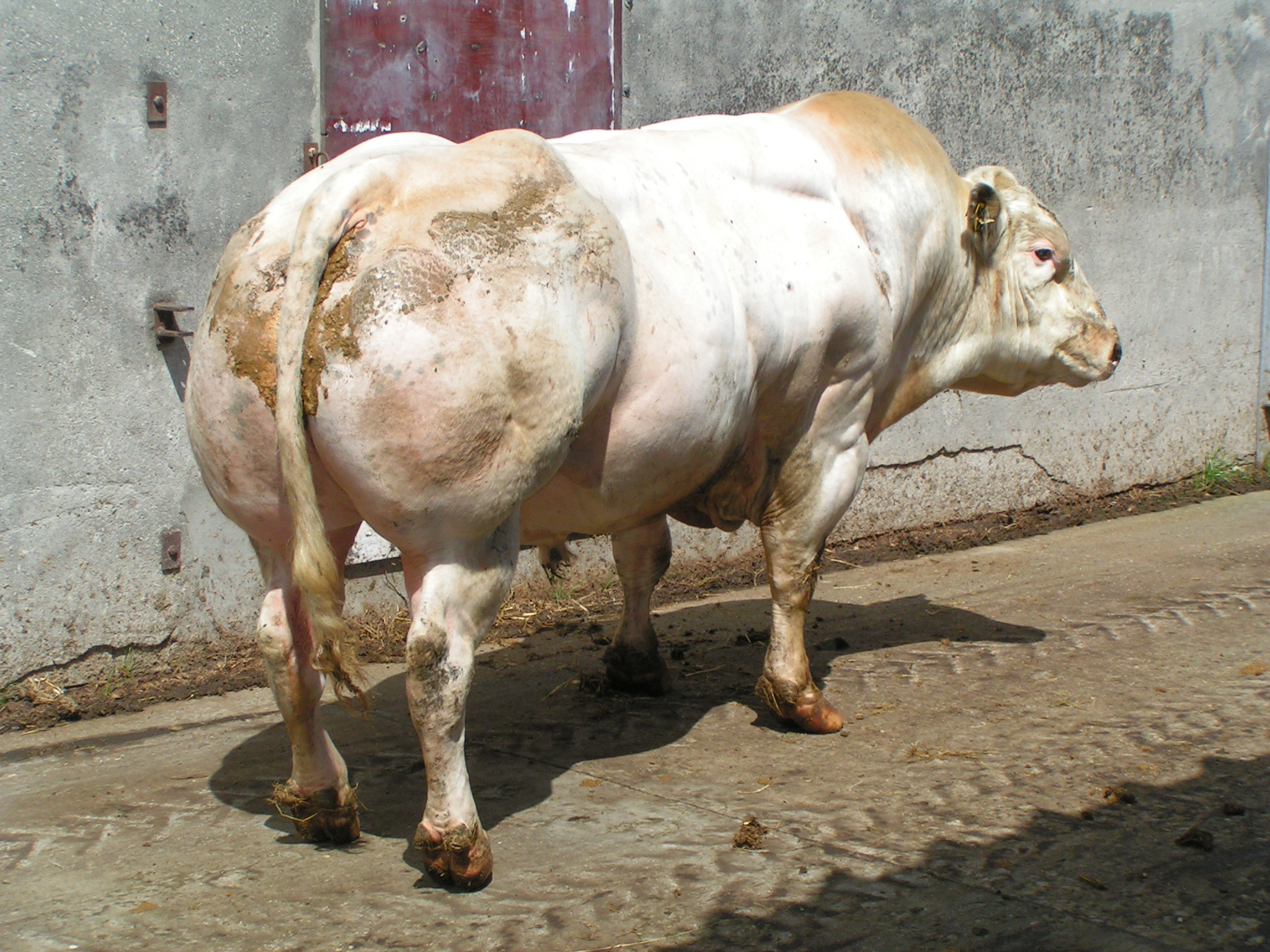 Ausgewachsener Zuchtbulle in einem Betrieb in Nordrhein Westfalen